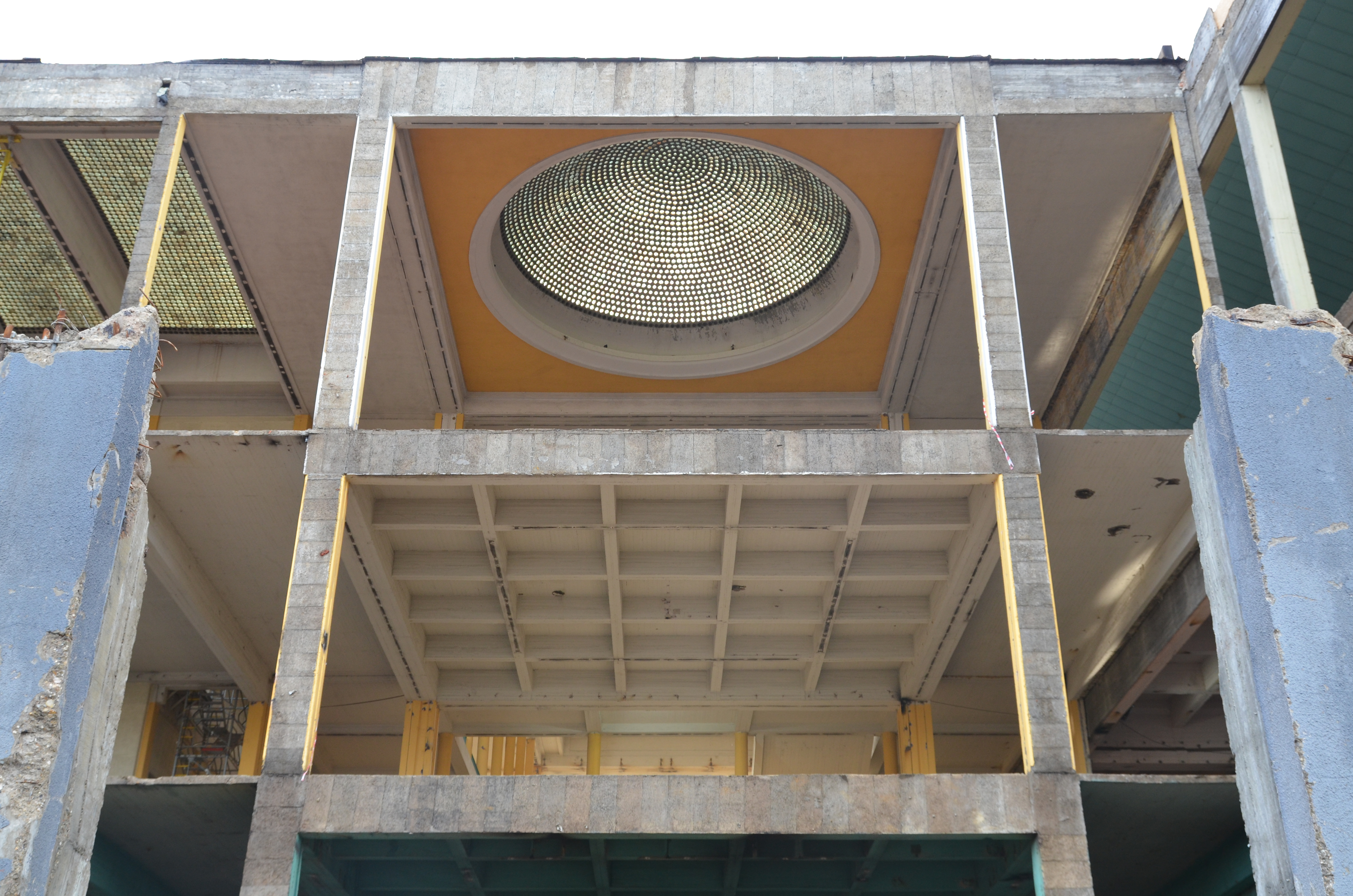 Charleroi (Belgique) - Palais des expositions. Transformation du bâtiment. Travaux de déconstruction vus depuis la rue de l'Ancre.